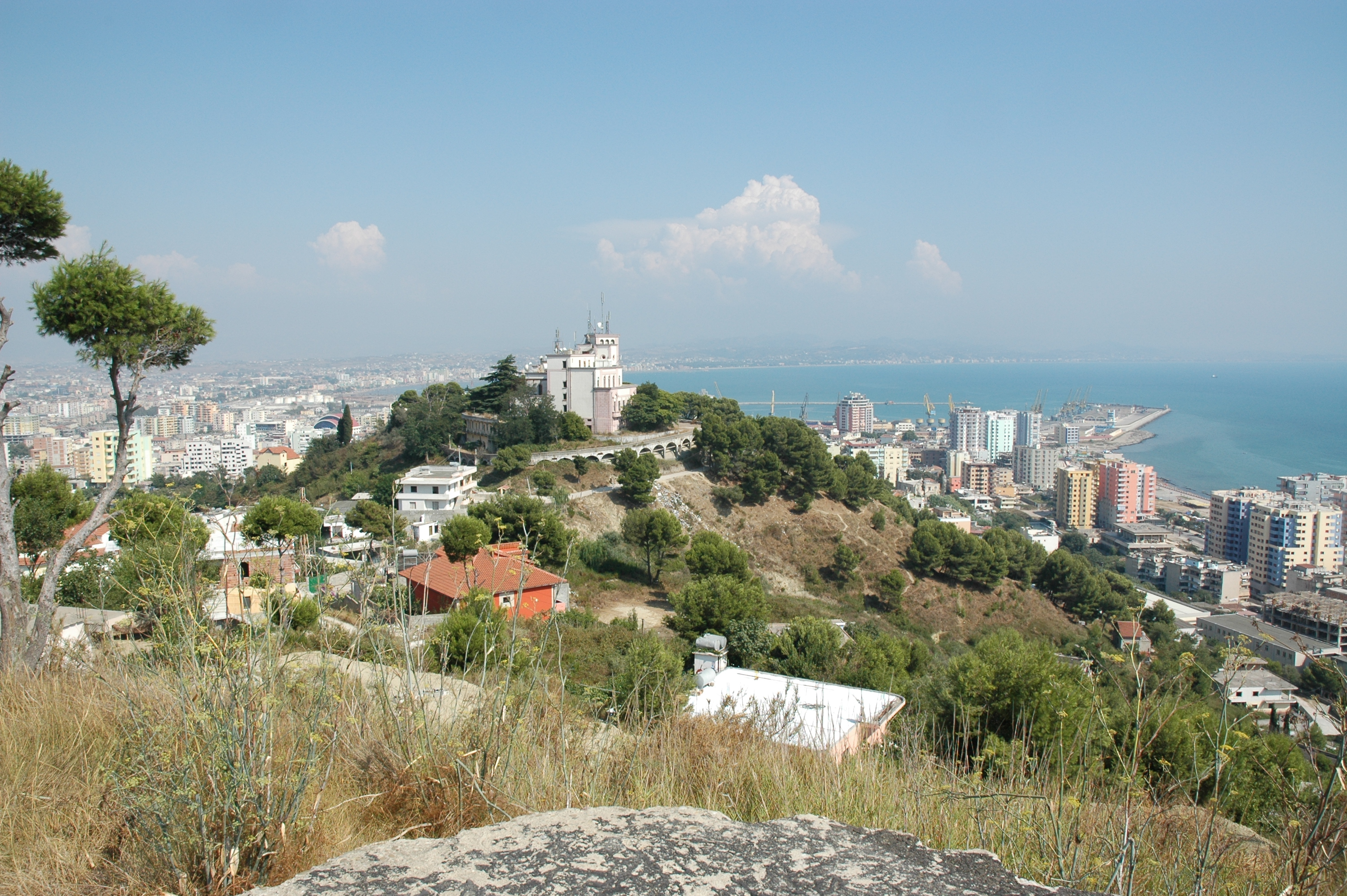 Durrës, Albania